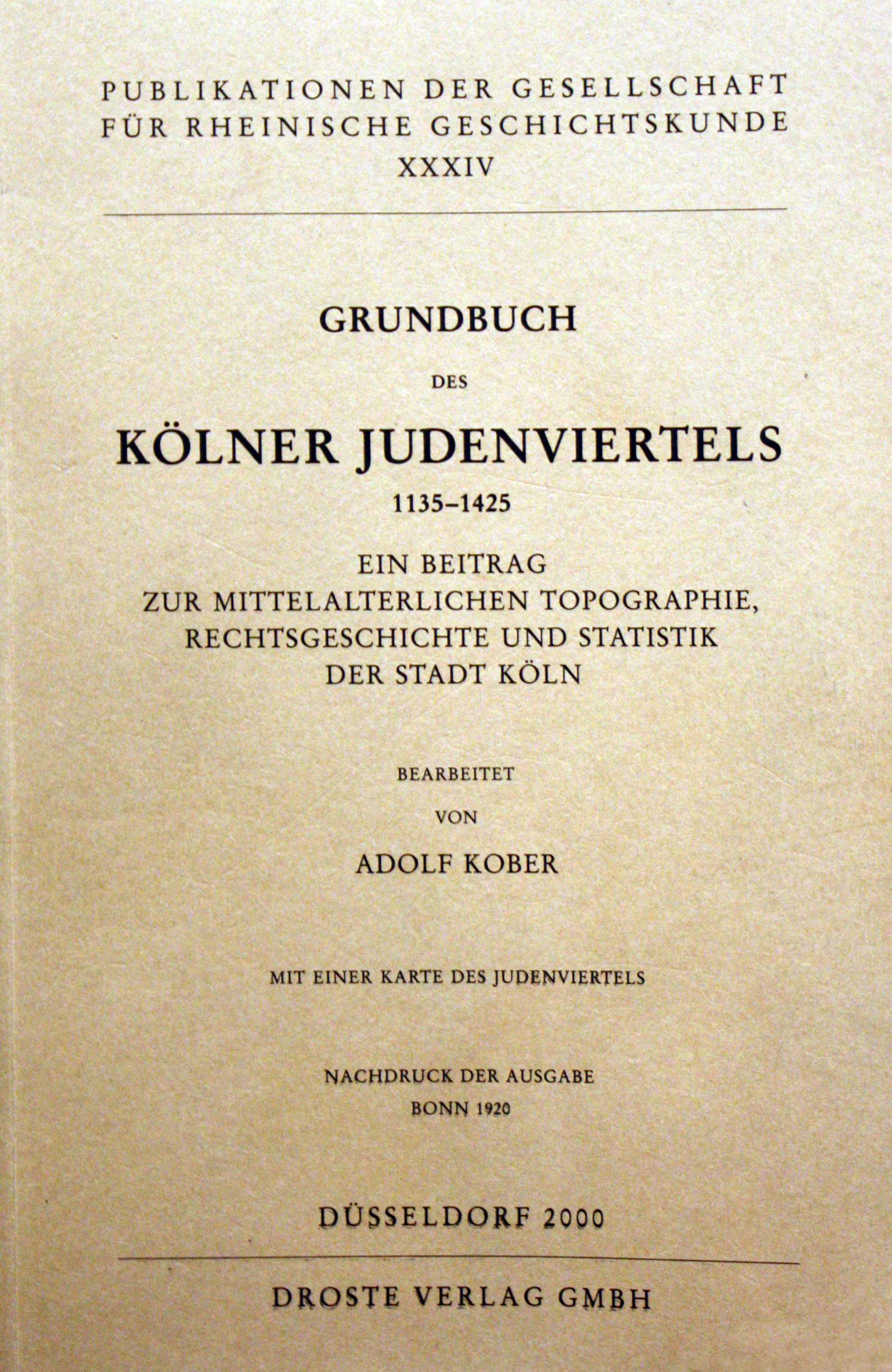 Adolf Kober, Vorderansicht des Einbandes „Grundbuchdes Kölner Judenviertels 1135-1425“ (Ausstellung Prätorium Köln)